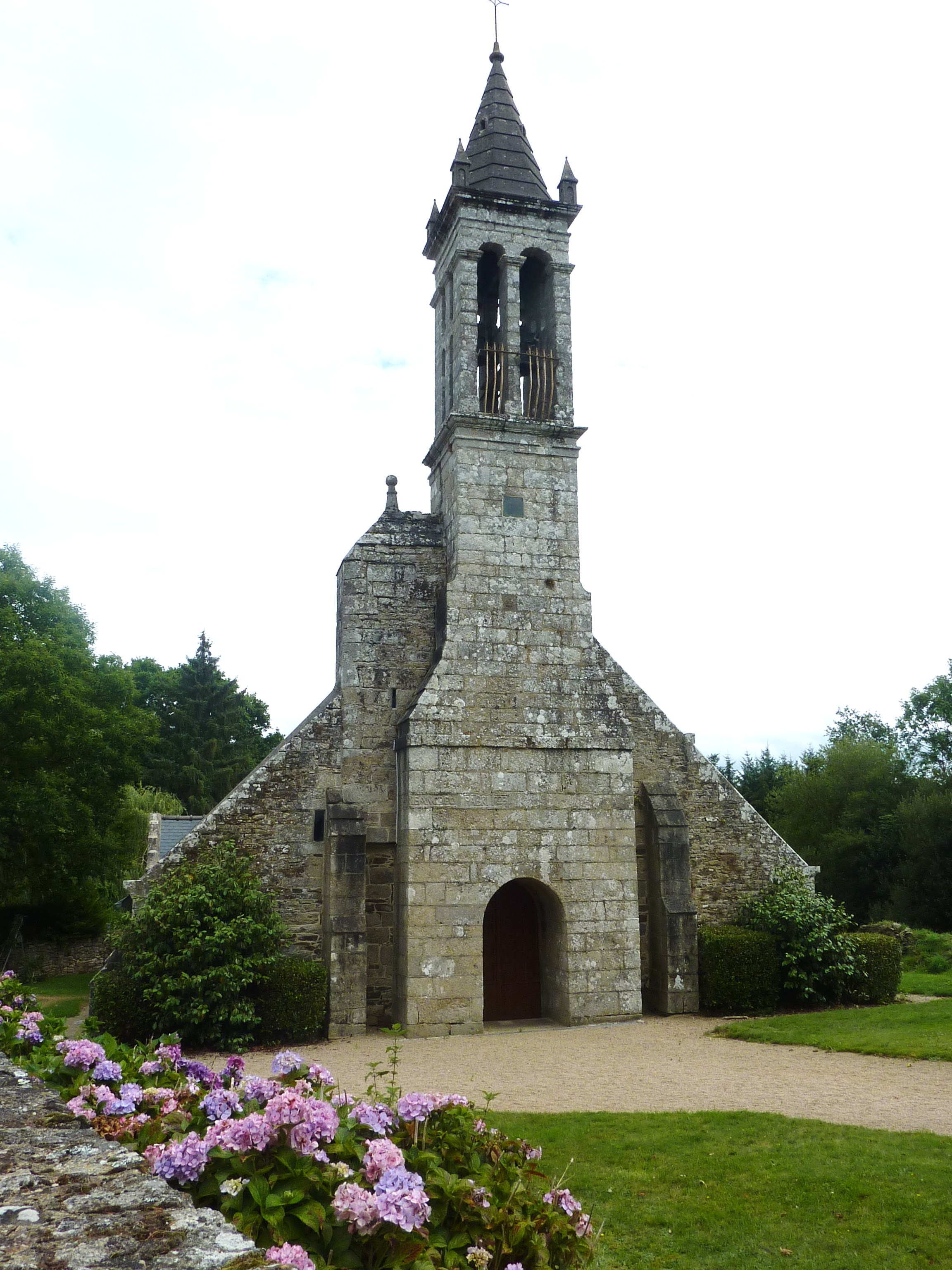 Locmaria-Berrien: la façade de l'église paroissiale